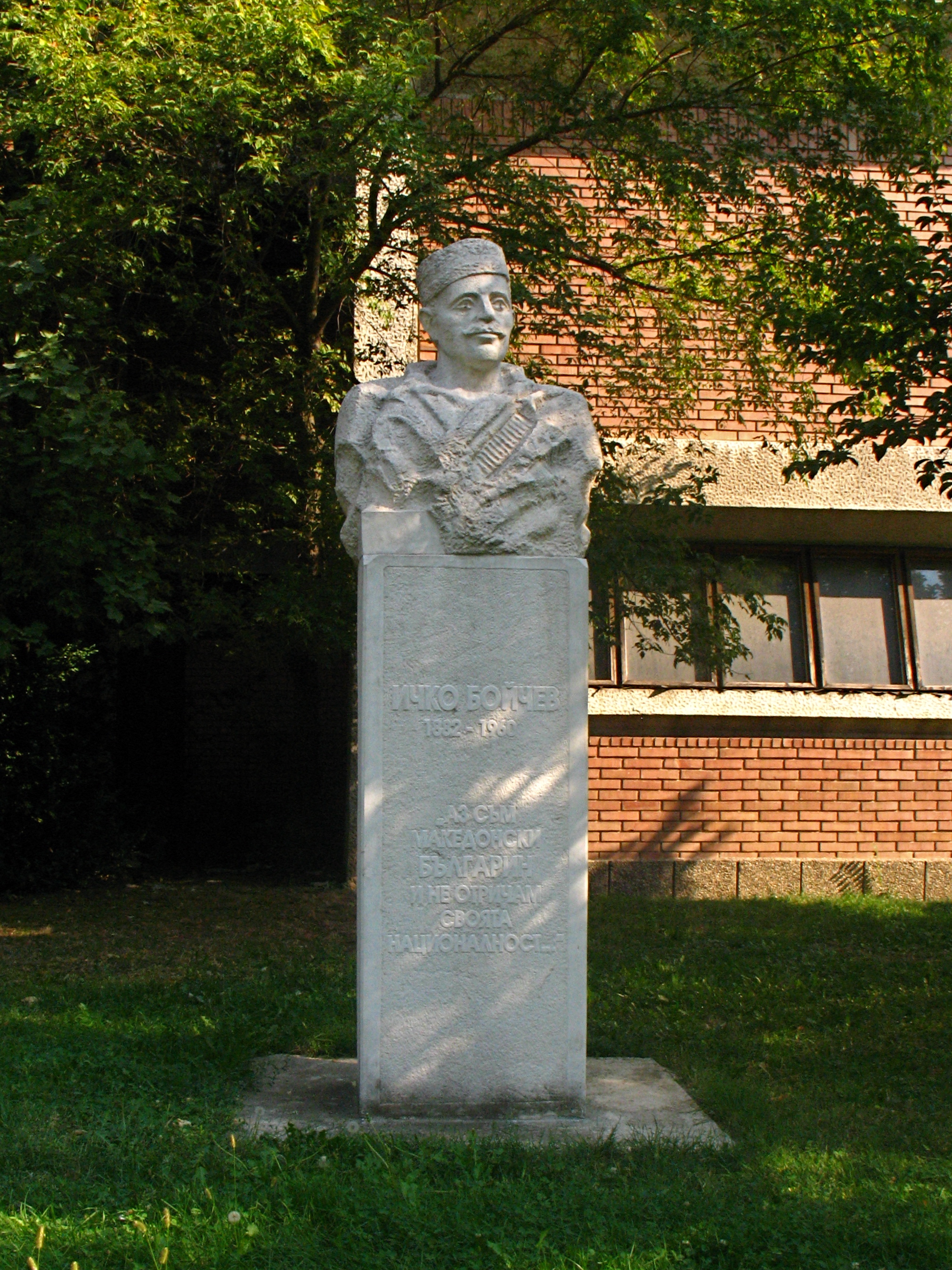 Паметник на Ичко Бойчев в квартал Вароша, Благоевград, България.